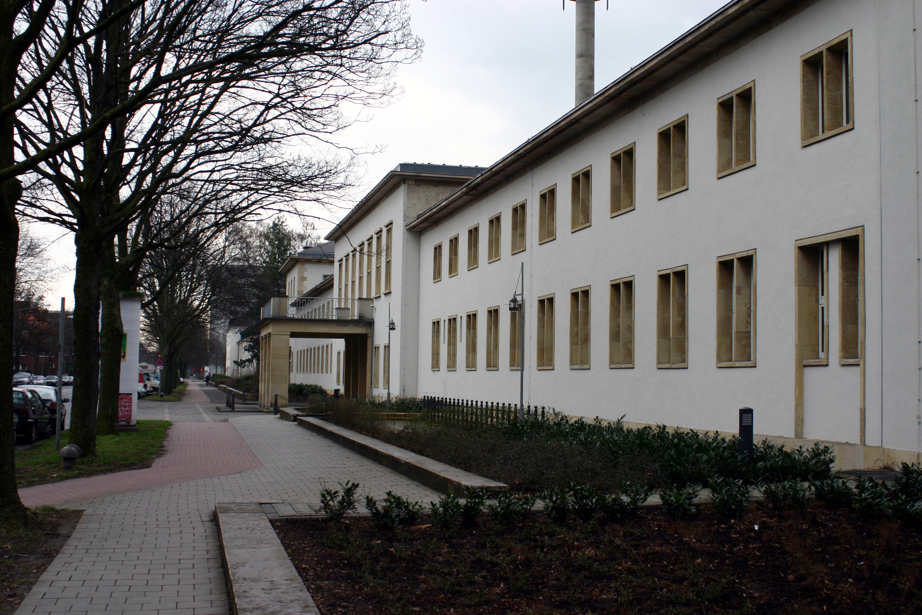 Gebäude des Lufttransportkommando Münster, ehemals Luftgaukommando, Architekt Ernst Sagebiel